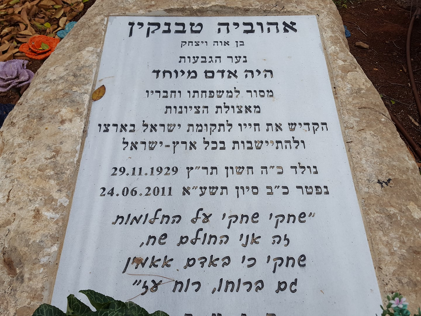 מצבת קברו של אהוביה טבנקין בבית העלמין עין חרוד מאוחד. צילום :אלי אלון